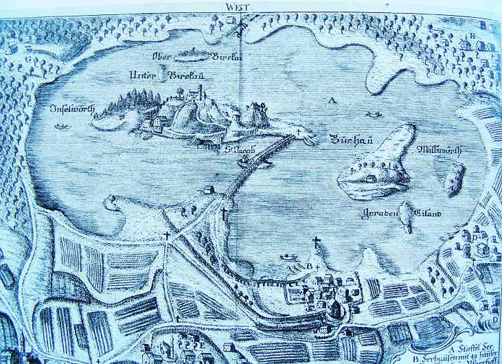 Alte Karte des Staffelsees. Sie zeigt noch den hölzernen Steg von Seehausen am Staffelsee über die Insel St. Jakob zur Insel Wörth. Die Karte ist nicht umrissgetreu, was eine noch frühere Erstellungszeit vermuten lässt. Norden ist rechts.